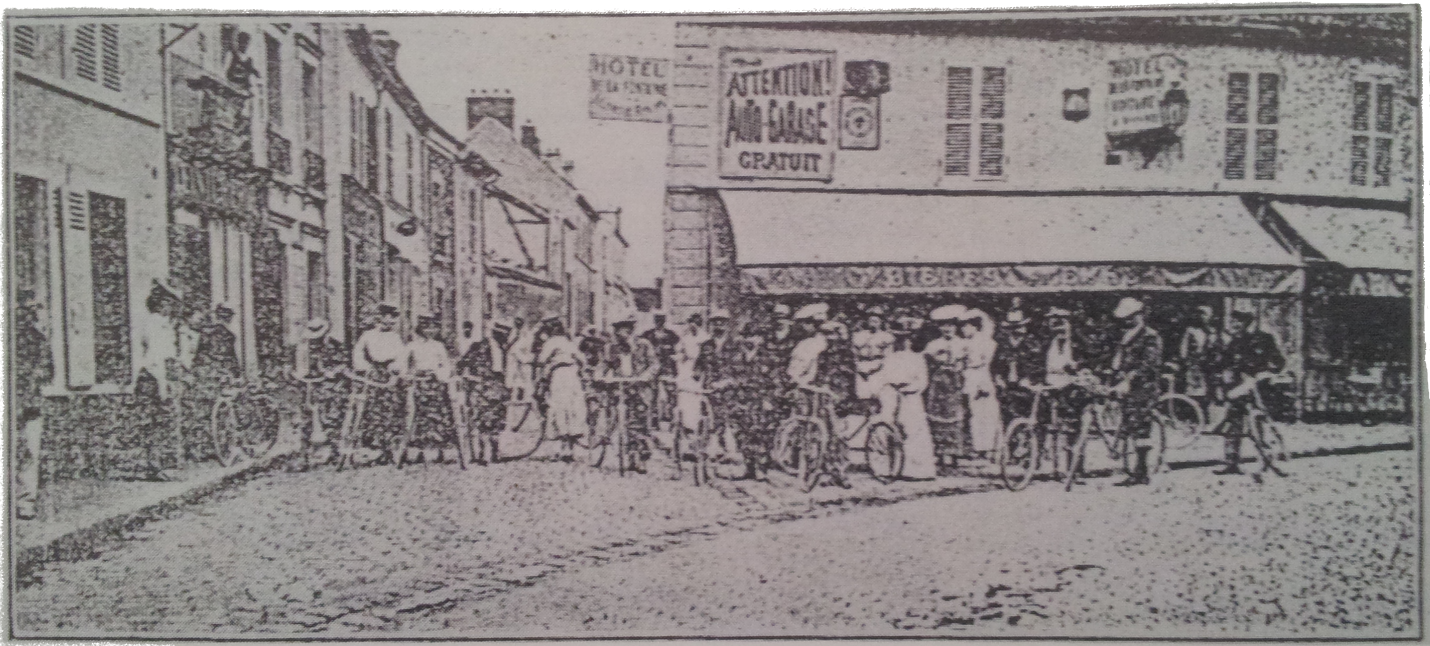 Sortie vélocipédique de l'association des Vendéens de Paris à Arpajon le 4 juin 1905. En 1903 est créée au sein de l'association la "Ligue Amicale des Joyeux Cyclistes de l'Association Fraternelle des Vendéens de Paris" (L.A.D.J.C.D.A.F.D.V.P.).